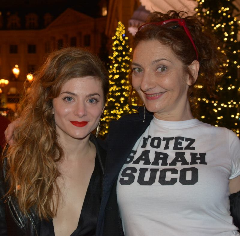 Sarah Suco et Corinne Masiero au dîner des révélations des César du cinéma